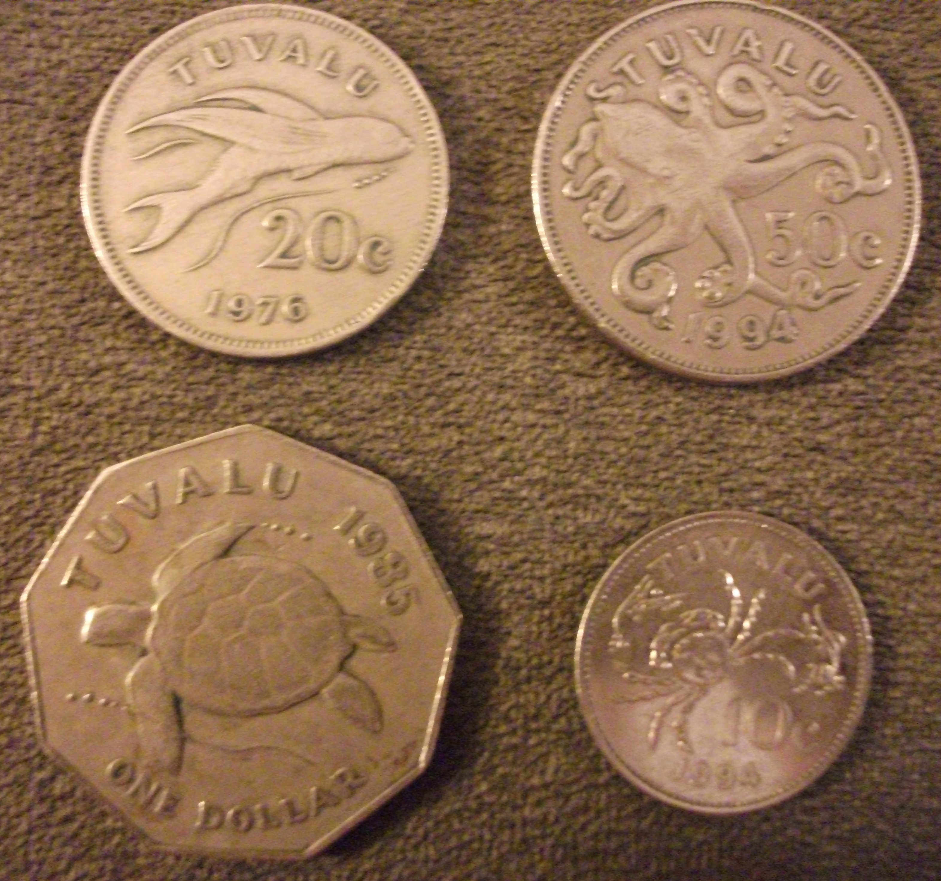 Tuvalu cent and dollar circualtion coins